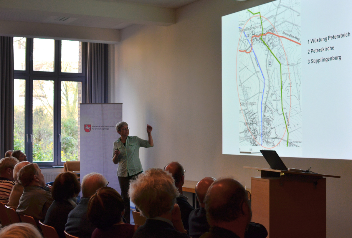 Vortrag zur Grubenhaussiedlung am Petersteich durch die Helmstedter Kreisarchäologin Monika Bernatzky im Niedersächsischen Landesamt für Denkmalpflege